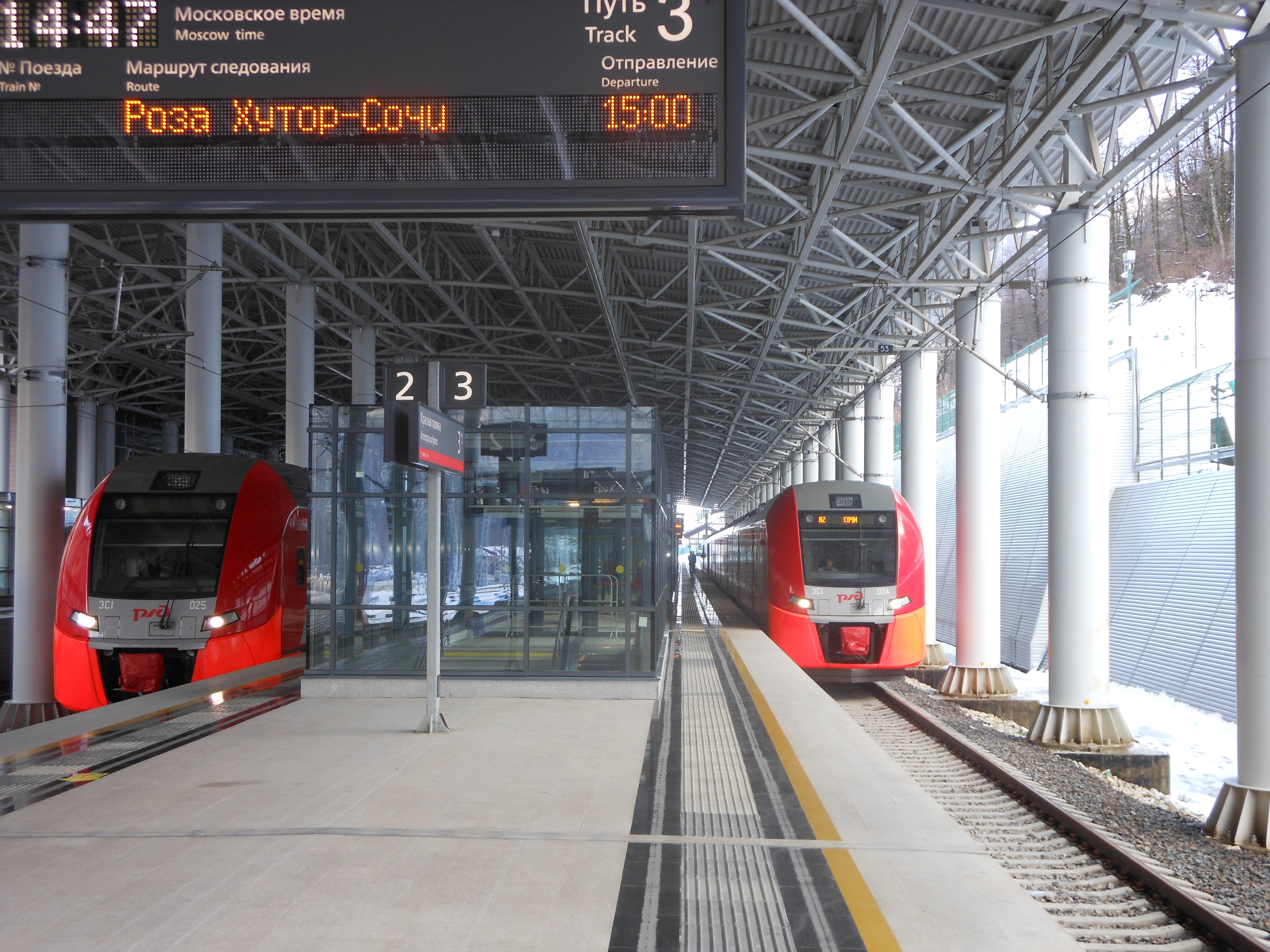 Железнодорожная станция Роза Хутор